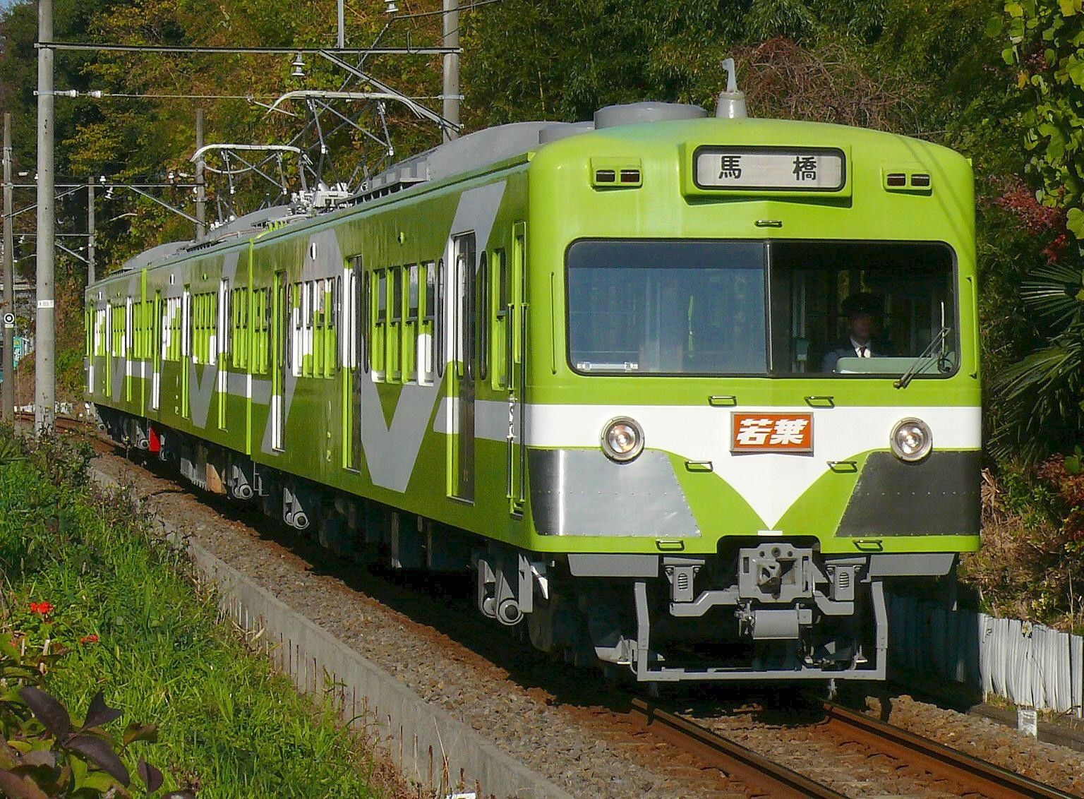 Ryutetu Type 3000 Train [Wakaba](Japan). 流鉄3000系電車の若葉号（西武101系電車改造） 流鉄流山線鰭ヶ崎～平和台の駅間にて、公道より撮影。